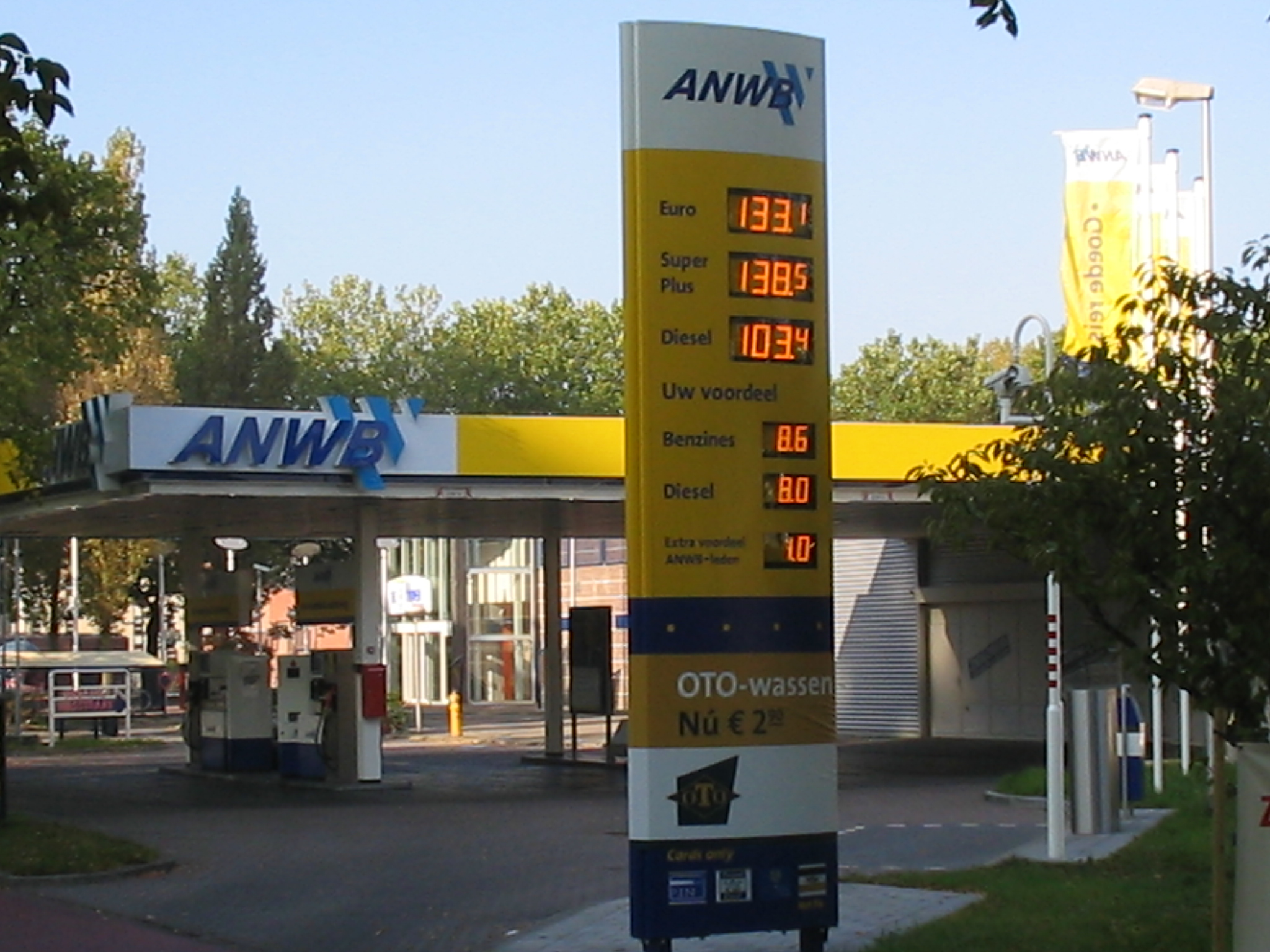 anwb tankstation in Delft,16 oktober 2005